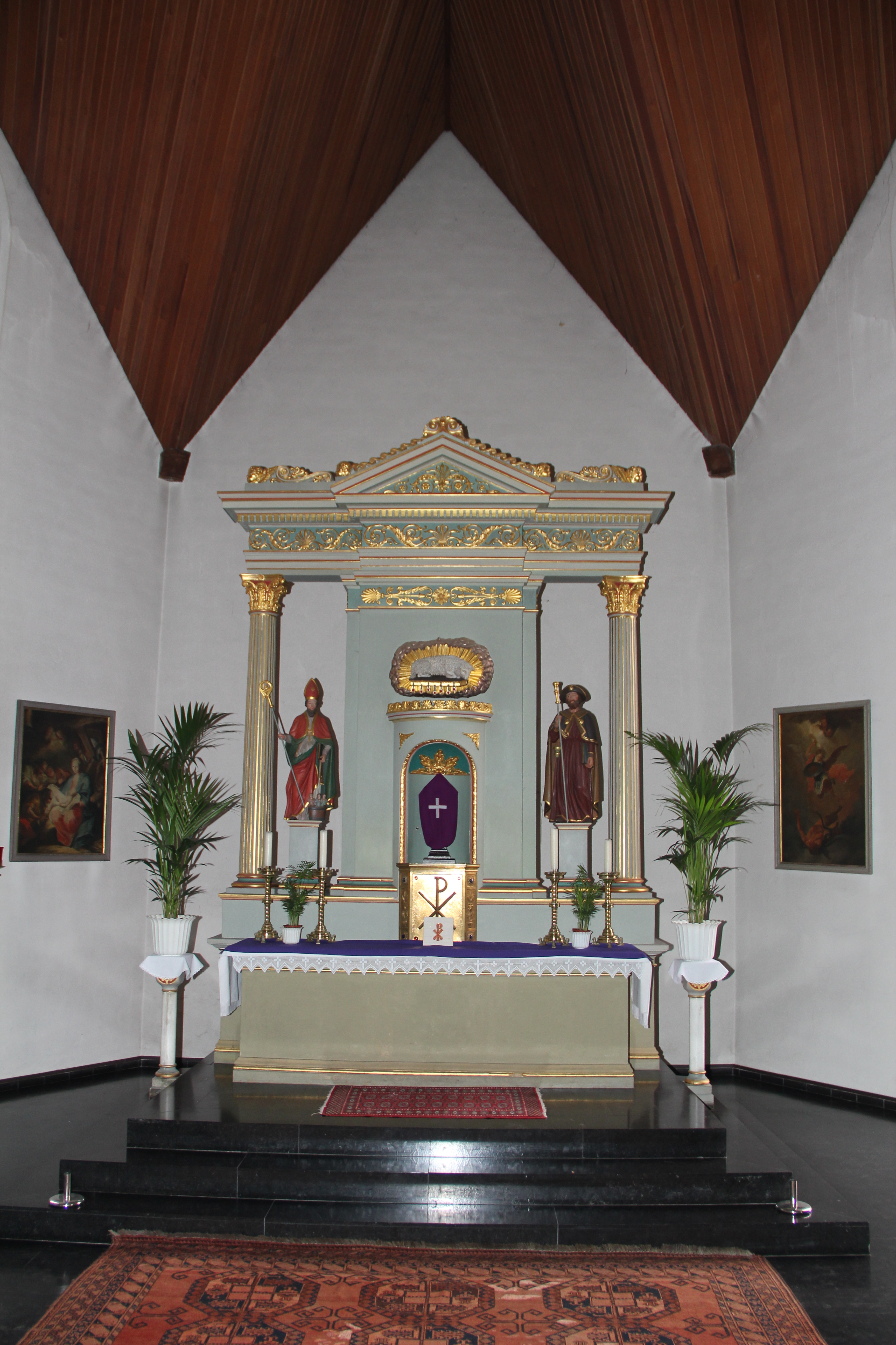 Chorraum der Sankt-Michael-Kirche in Bollendorf